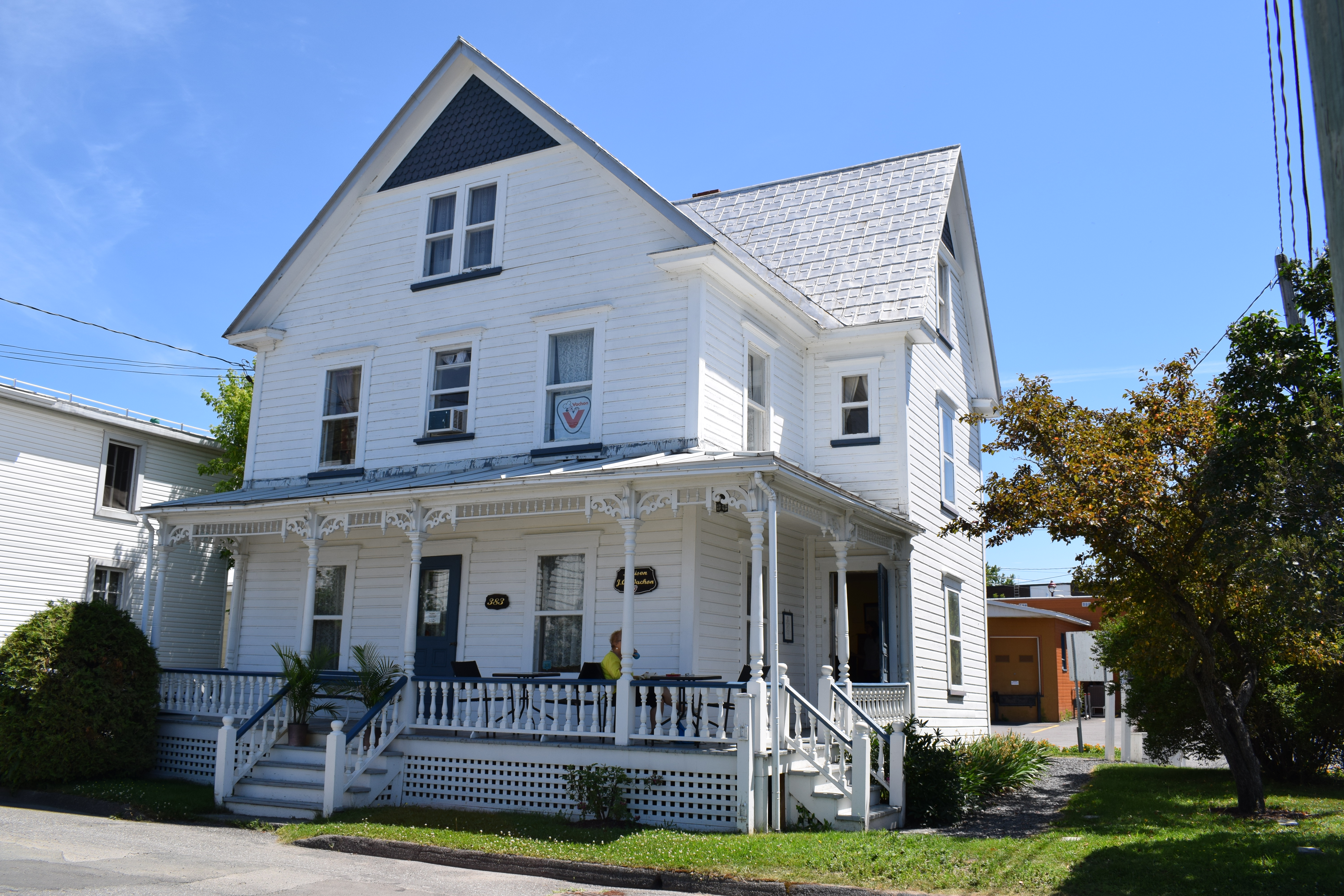 Maison J.-Arcade-Vachon, sise au 383 avenue de la Coopérative à Sainte-Marie, Quebec